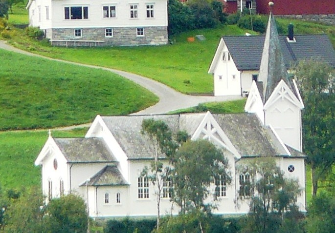 Gimmestad church in Gloppen, Sogn og Fjordane, Norway.jpg